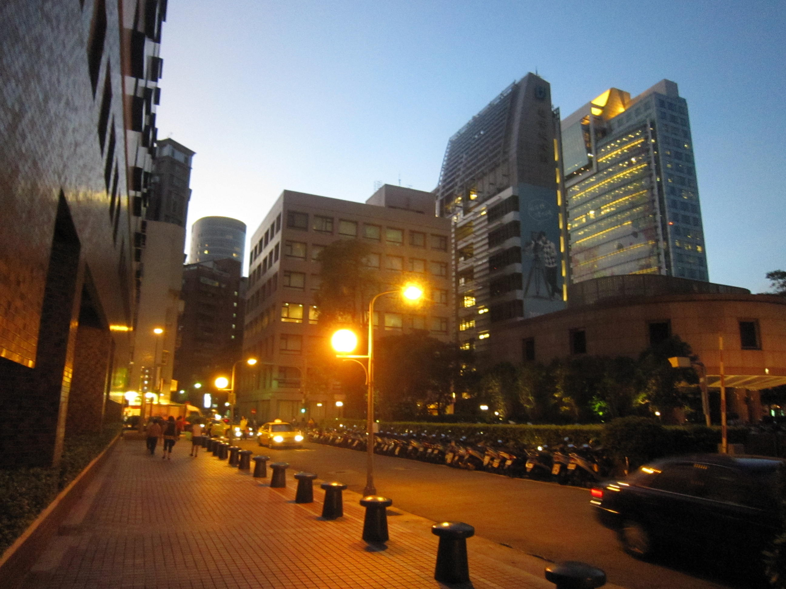 國泰綜合醫院總院第二分館（中）、福安紀念館（右二）、富邦金融中心（右一）夜景。